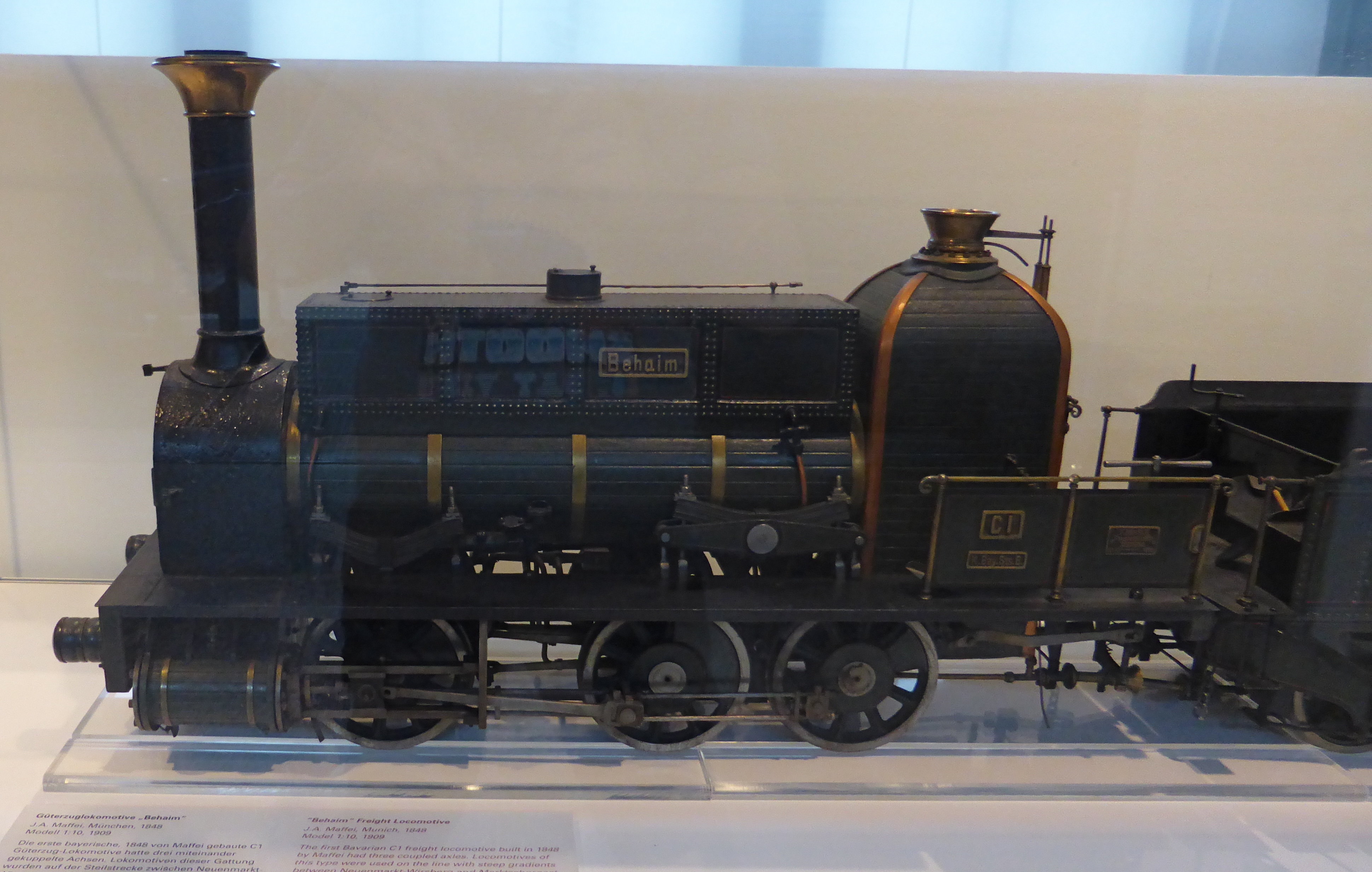 Modell der Bayerischen C I Behaim im Verkehrszentrum München